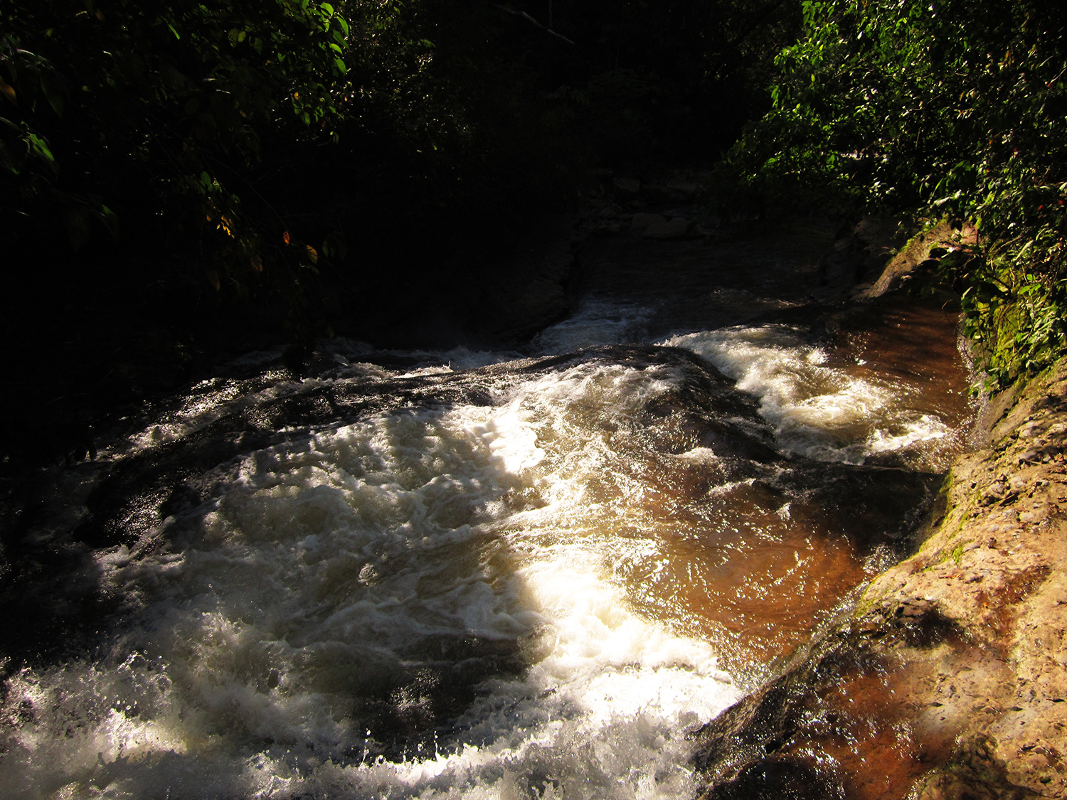 Río Huaynabe cerca a la cascada Garganta de Loro